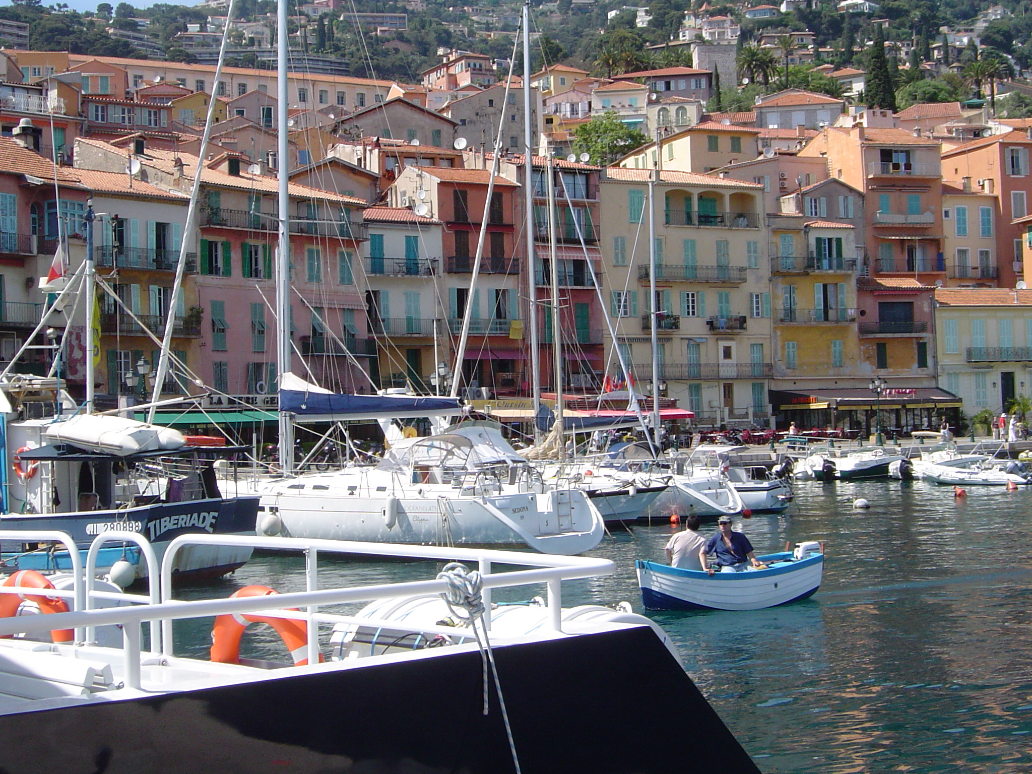 Villefranche sur Mer